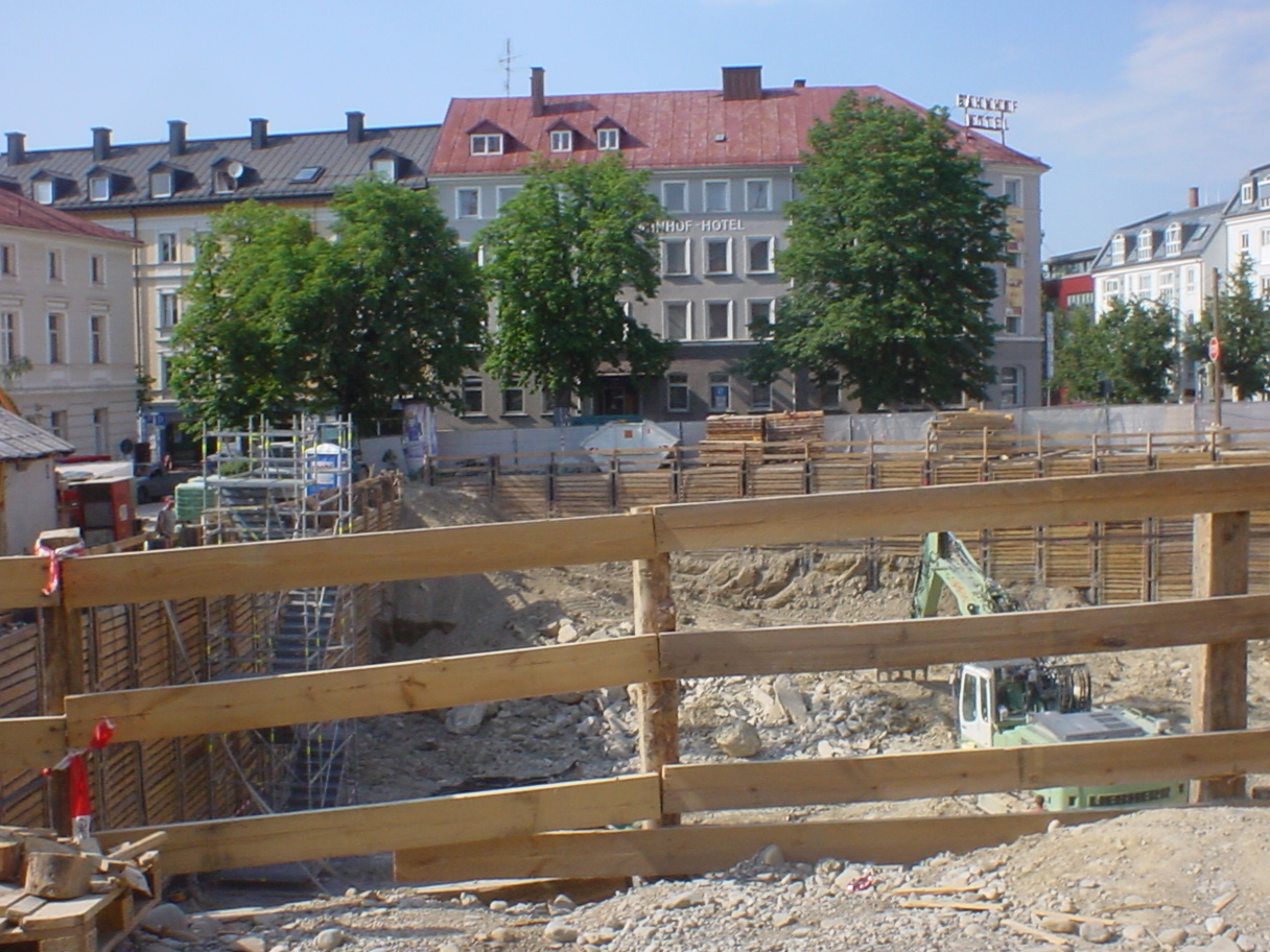 Baugrube des August-Fischer-Hauses in Kempten